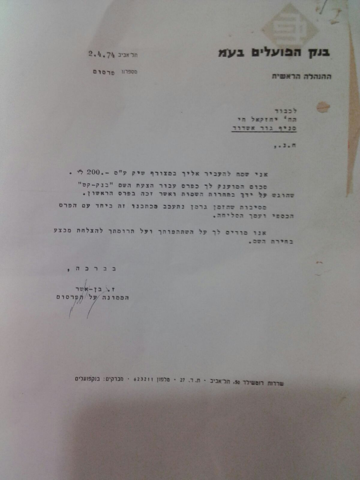 מכתב הזכייה בתחרות מציאת שמות למכשיר להוצאת כספים (ATM) שערך בנק הפועלים בשנת 1974